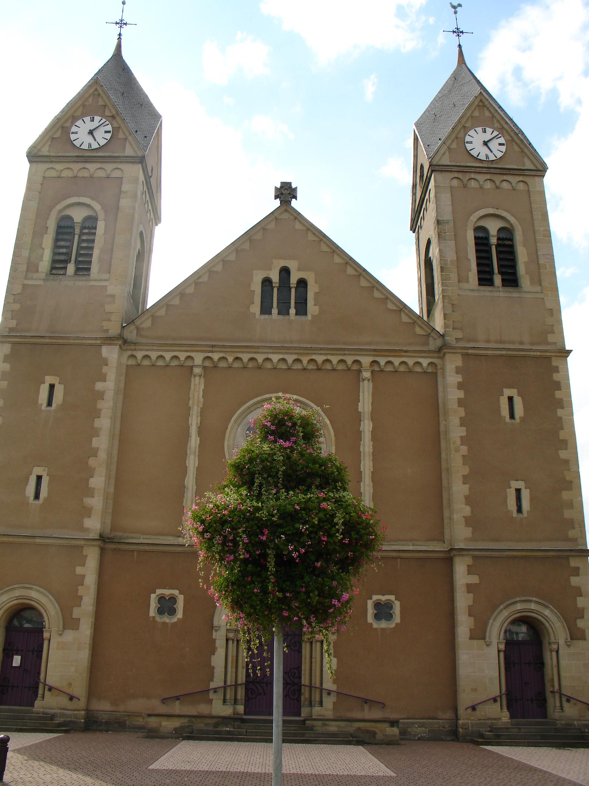 L'Église Saint-Gérard-Majella de Carling.